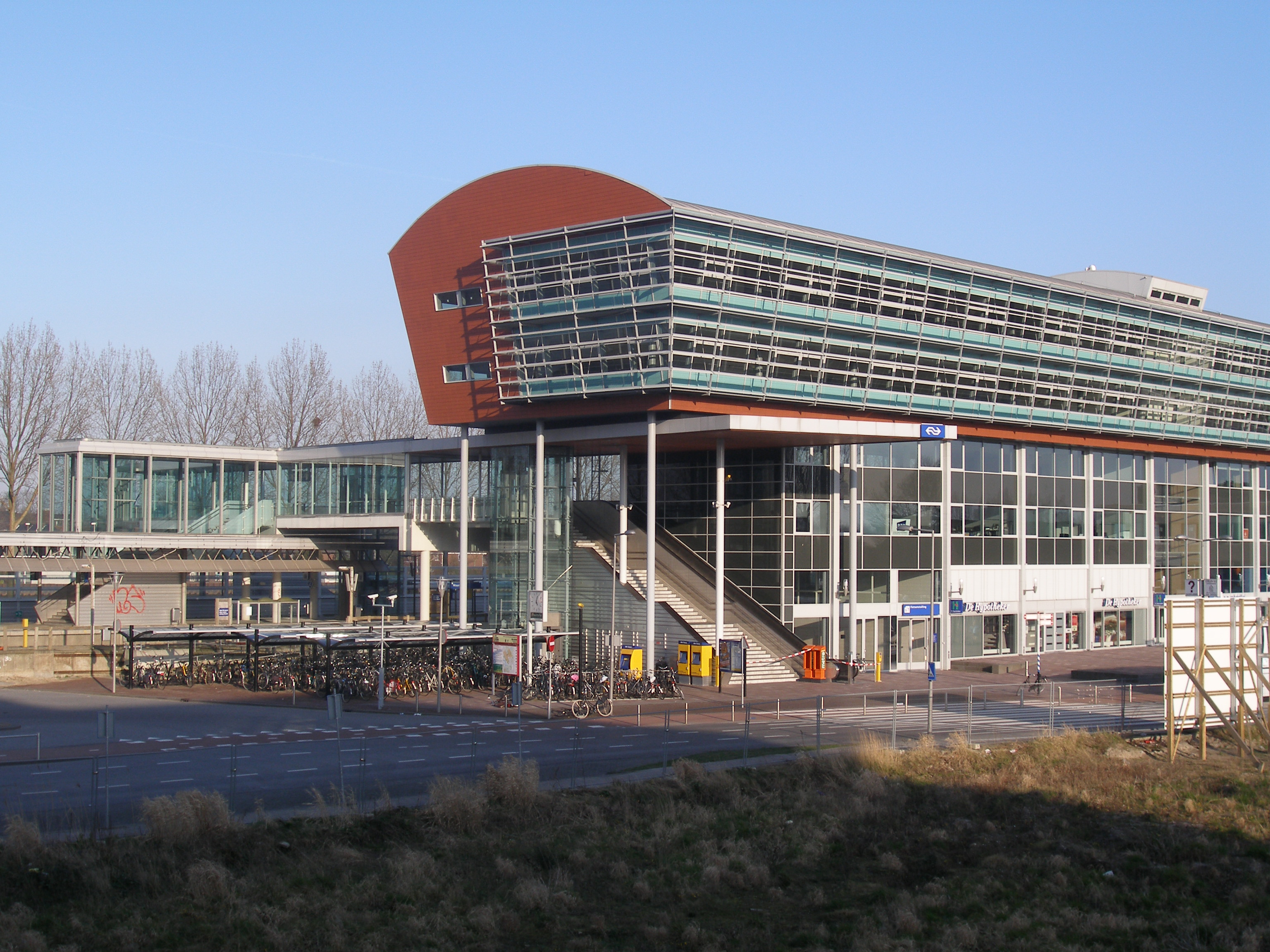 NS station Maarssen met ervoor kantoorgebouw, 11-03-2007, japiot